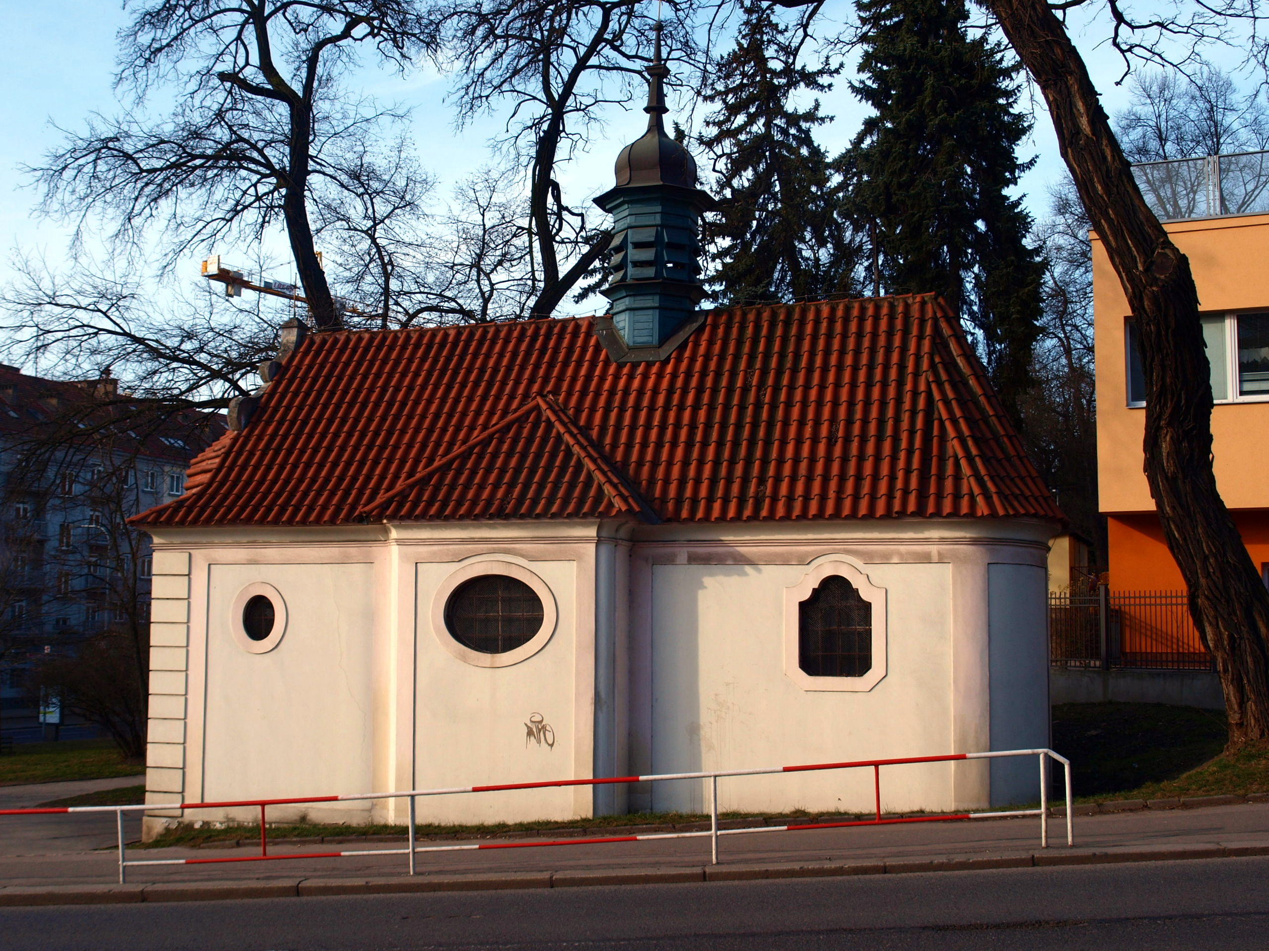 Smíchov, kaple Nanebevzetí Panny Marie